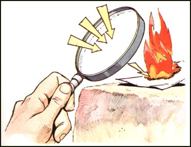 INTRODUCCIÓN Los sistemas térmicos cuentan con procesos que de alguna forma intercambian energía calorífica con su medio ambiente. Pueden ser procesos químicos, hornos, casas o calentadores de agua, entre otros. Las señales de entrada y salida para este tipo de sistemas son la temperatura, la energía calorífica y la potencia calorífica. La ley natural básica para los sistemas térmicos es el balance de energía. Ésta nos dice que el cambio en la energía calorífica por unidad de tiempo es igual a la potencia inferida menos la extraída. El consenso general de la comunidad que se dedica al estudio de los sistemas térmicos ha sido enfocado al campo de la energía, debido al gran número de actividades y procesos desarrollados por el hombre que involucran de una u otra forma el uso de la energía, en relación con el aprovechamiento y explotación óptima de los recursos energéticos. La dinámica de evolución de los sistemas térmicos permite analizar y resolver problemas complejos relacionados con los nuevos diseños enfocados al ahorro de la energía, tema de especial interés en la industria de cualquier país. La siguiente investigación se enfoca al estudio de los sistemas térmicos relacionados con la generación de energía eléctrica a partir de la quema de combustibles fósiles, tal es el caso especifico de las centrales termoeléctricas, las cuales se encuentran conformadas principalmente por calderas y turbinas de vapor, además de otra serie de equipos que permiten la generación de energía eléctrica. Para dar desarrollo a la investigación, el trabajo esta conformado por una introducción, el marco teórico donde se define lo que es un sistema térmico, se describen algunos equipos que lo conforman, además se explica en que consisten los sistemas térmicos solares, los cuales están siendo desarrollados en muchos países con la finalidad de minimizar el gasto de energía y la contaminación ambiental generada por la quema de los combustibles fósiles.